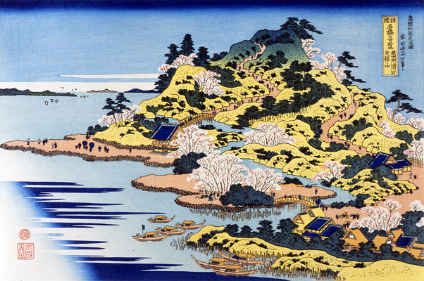 摂洲阿治川口天保山(せっしゅうあじかわぐちてんぽうざん)